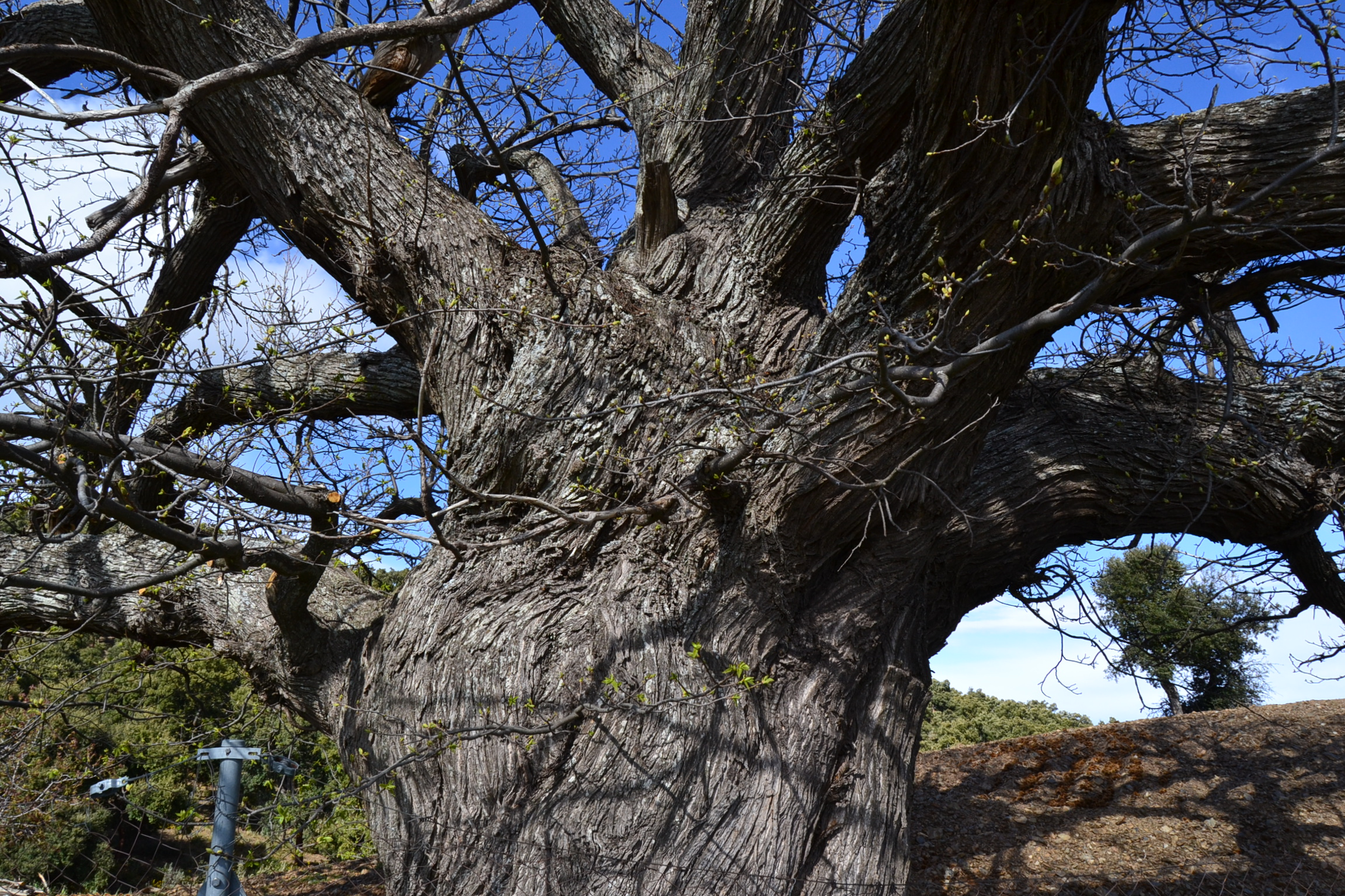 Enorme castaño legendario junto a la Haza de Lino. Abril de 2012